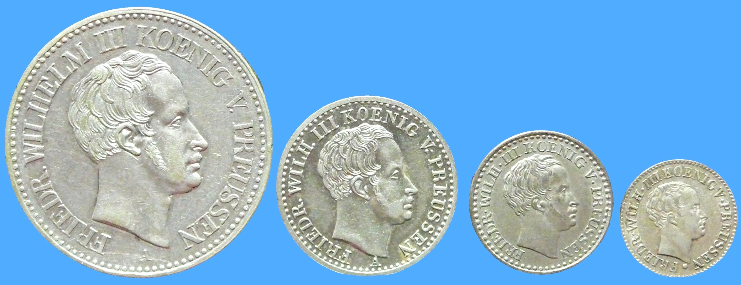 Königreich Preußen Friedrich Wilhelm III. König von Preußen 1797-1840 Münzprägung gemäß Gesetz über die Münzverfassung in den preußischen Staaten vom 30. September 1821 Vorderseite der Kurantmünzen 1 Taler und 1/6 Taler im 14-Taler-Münzfuß und Scheidemünzen 1- und 1/2-Silbergroschen im 16-Taler-Münzfuß